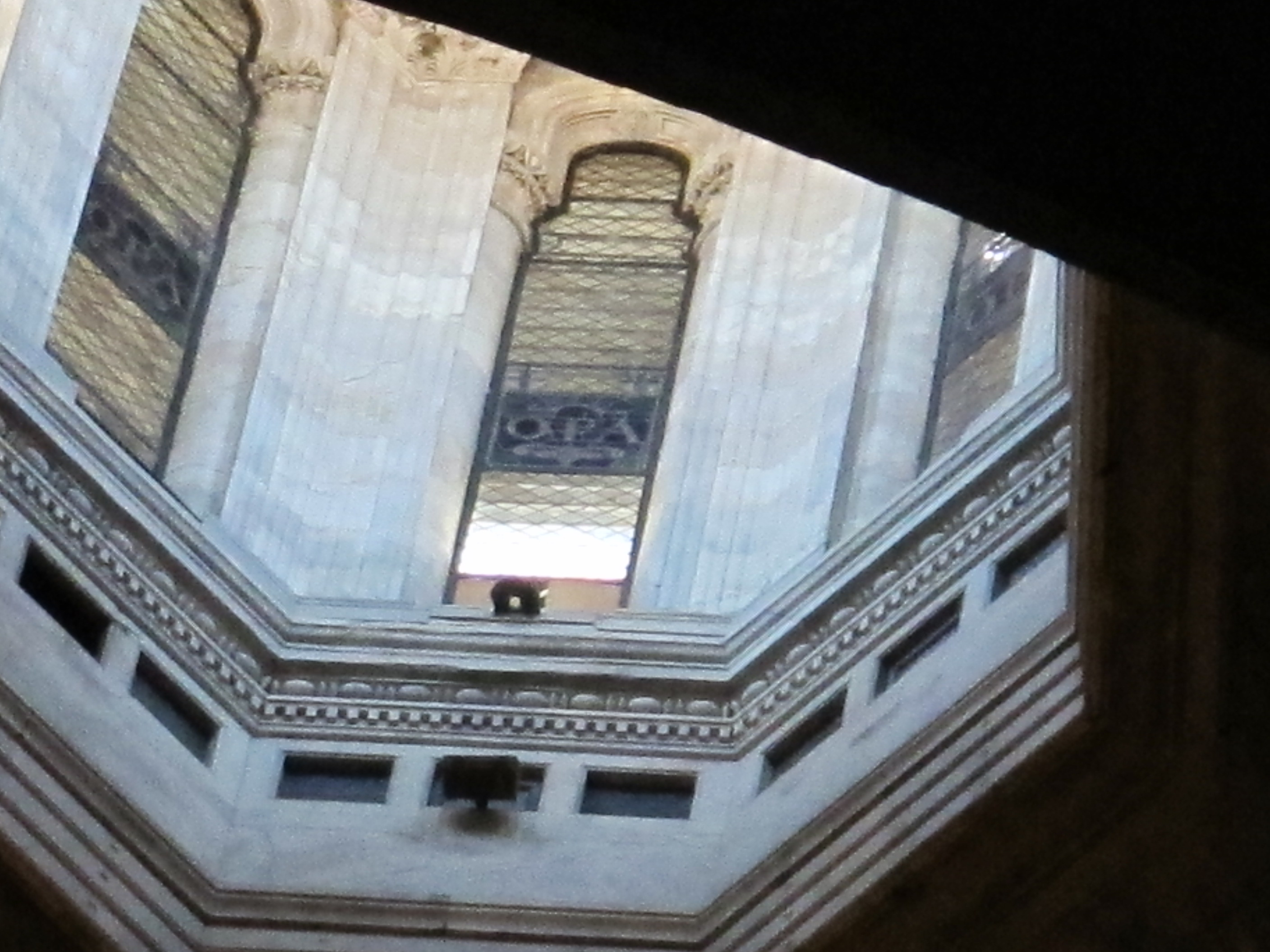 Duomo di firenze, lanterna, int